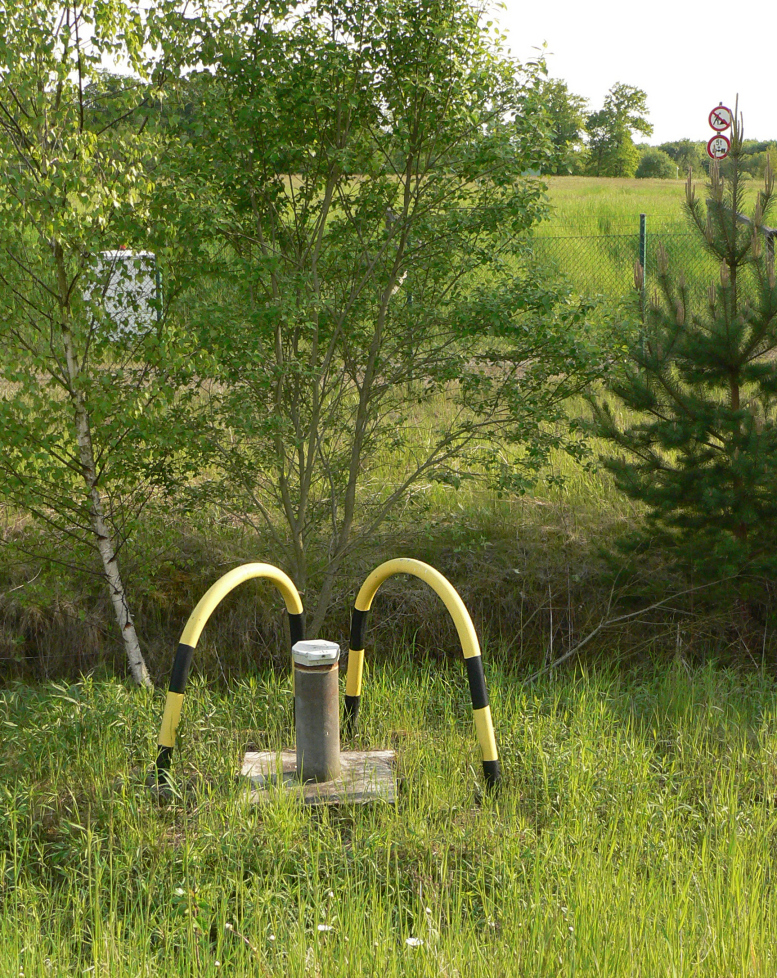 Messrohr am Gelände der Sonderabfalldeponie Münchehagen